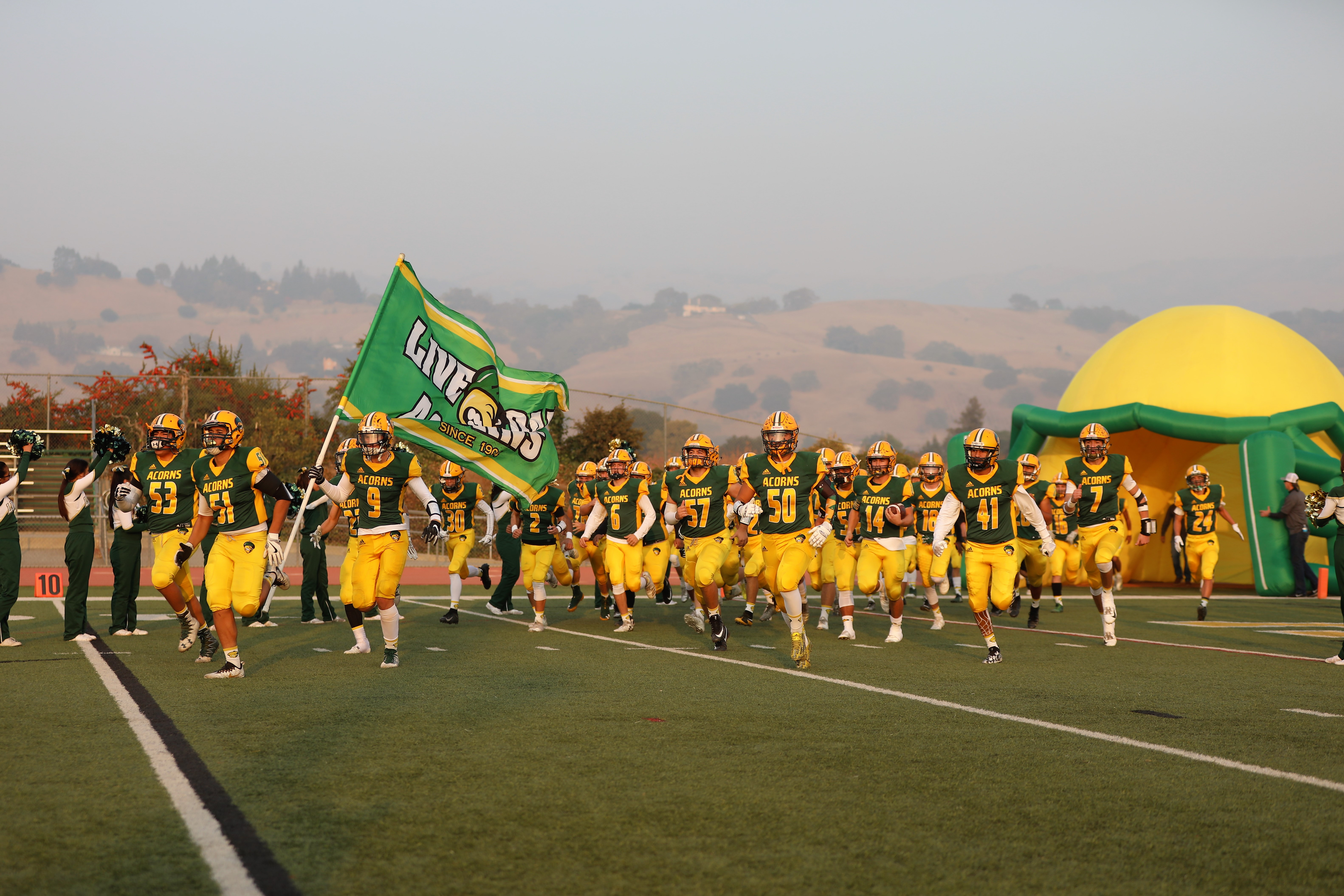 IMGL1597